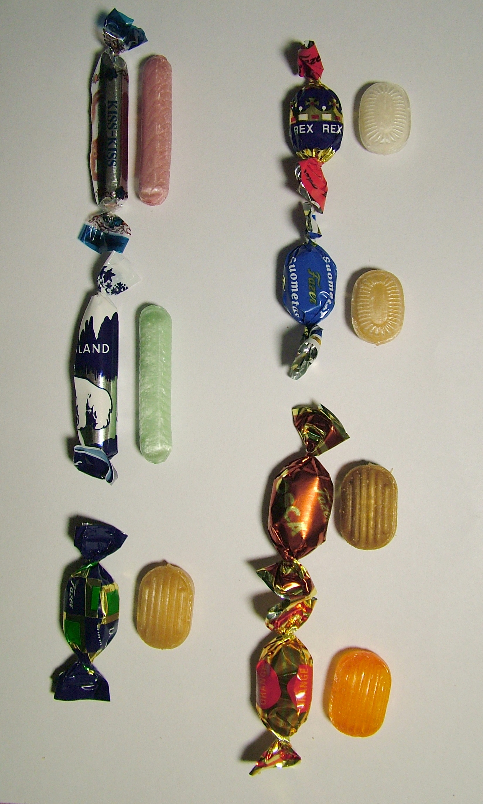 Fazerin Parhain -makeisia